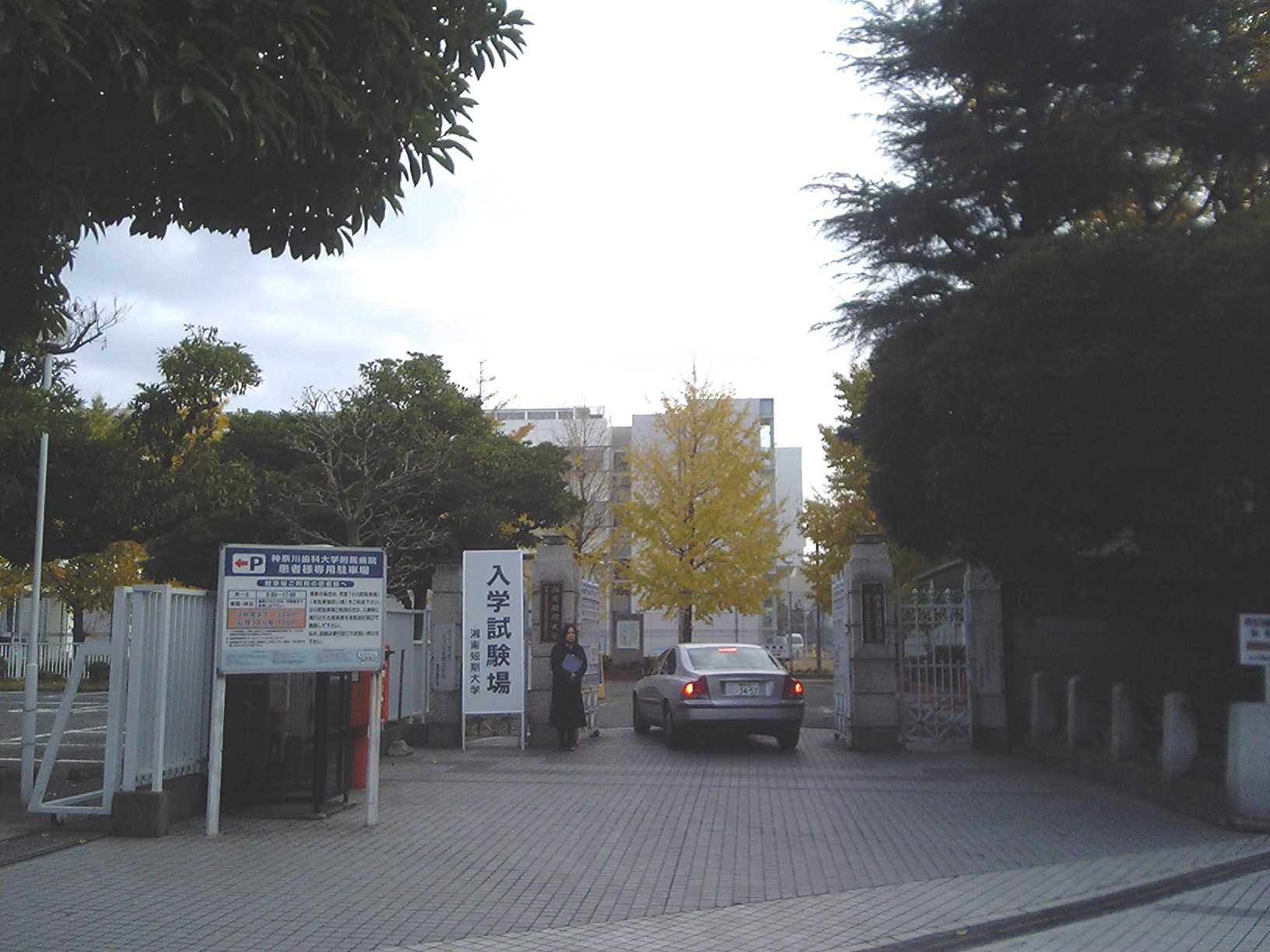 神奈川歯科大学